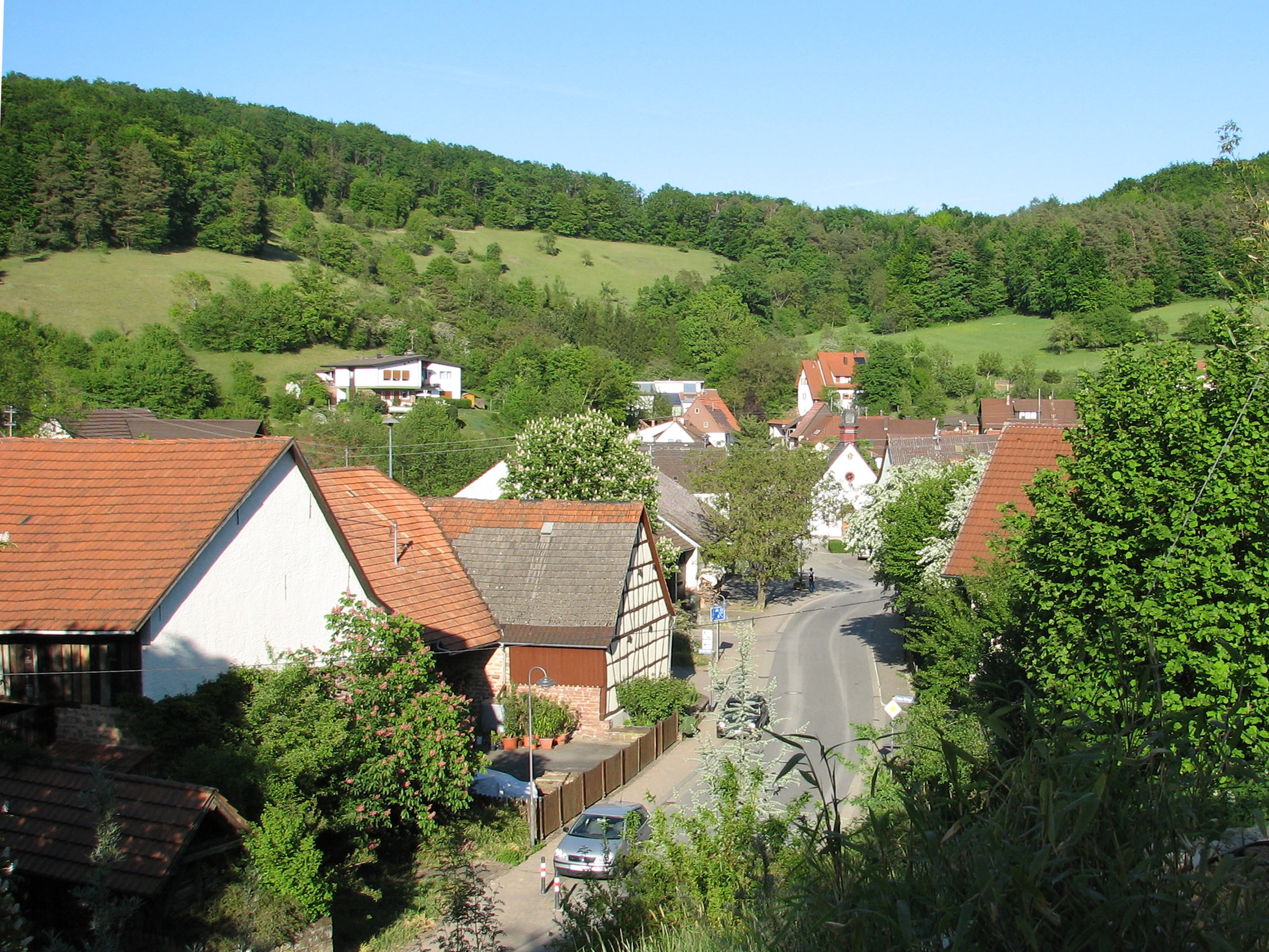 Nüstenbach, part of Mosbach